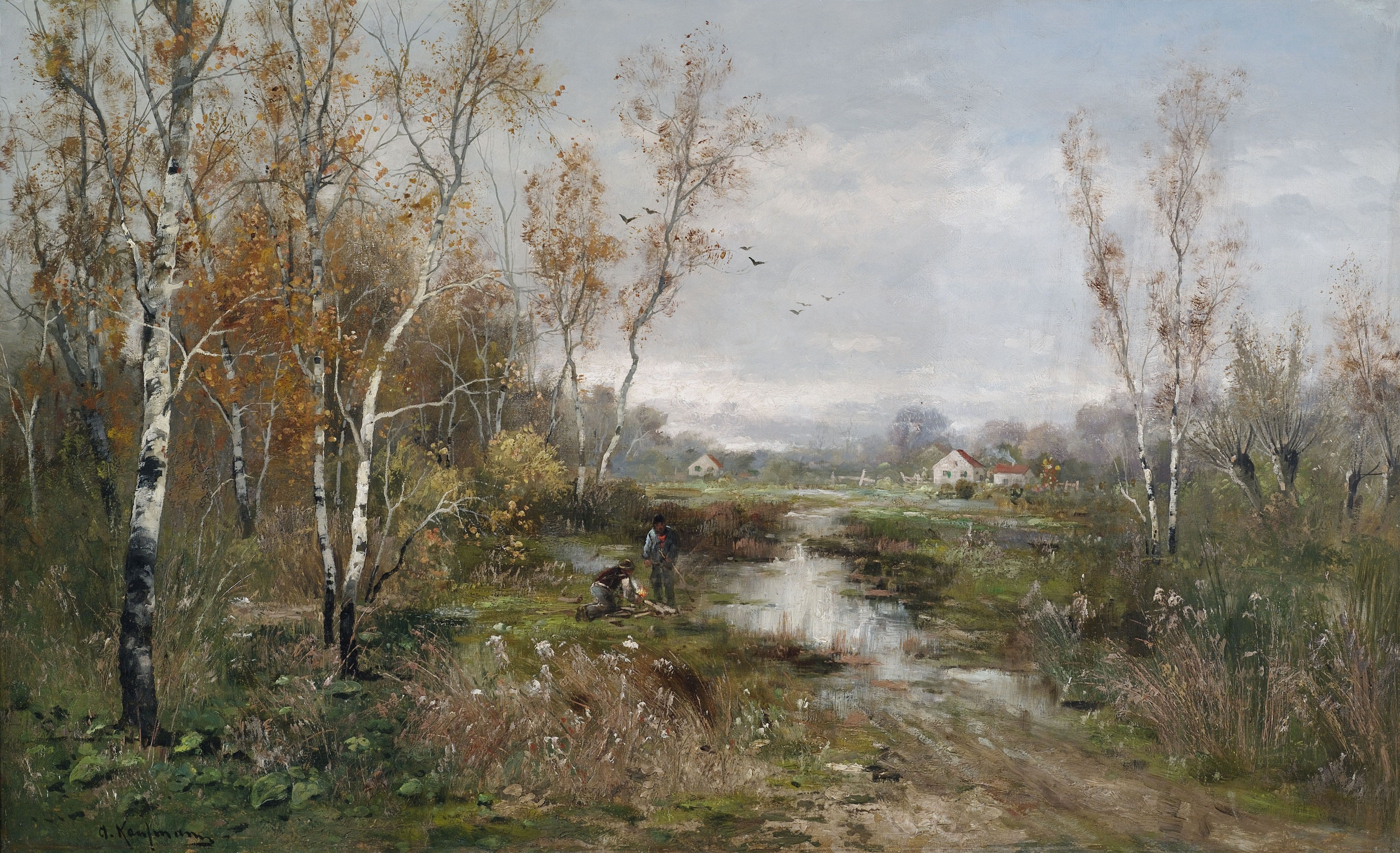 Herbstliche Moorlandschaft an einem Birkenhain.